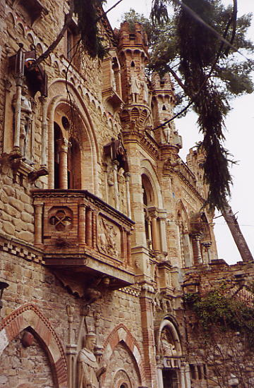 Facciata principale dal lato est